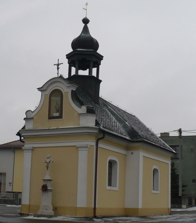 Kaple Zvěstování Panny Marie v Oticích